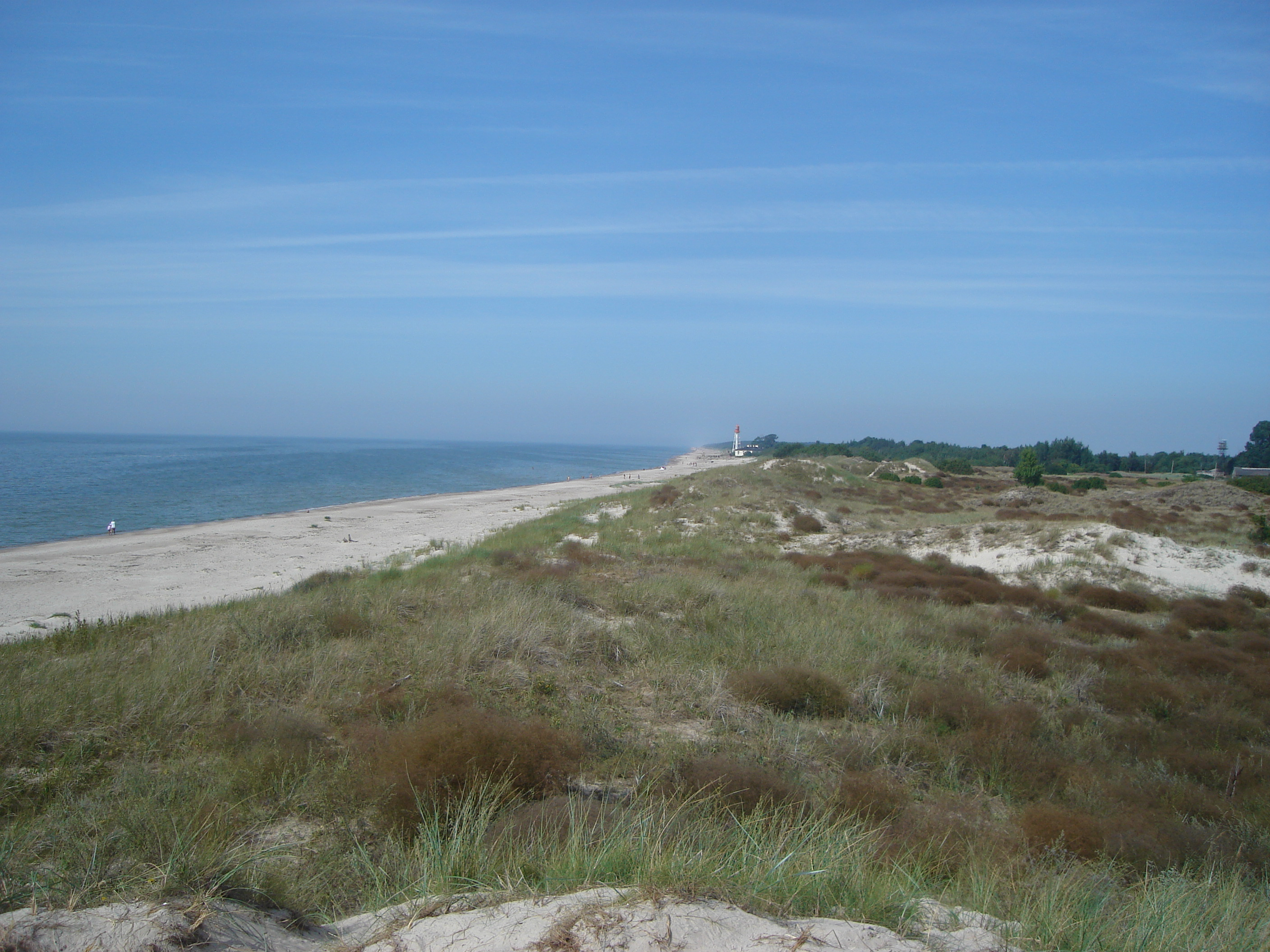 Rucava parish, Latvia